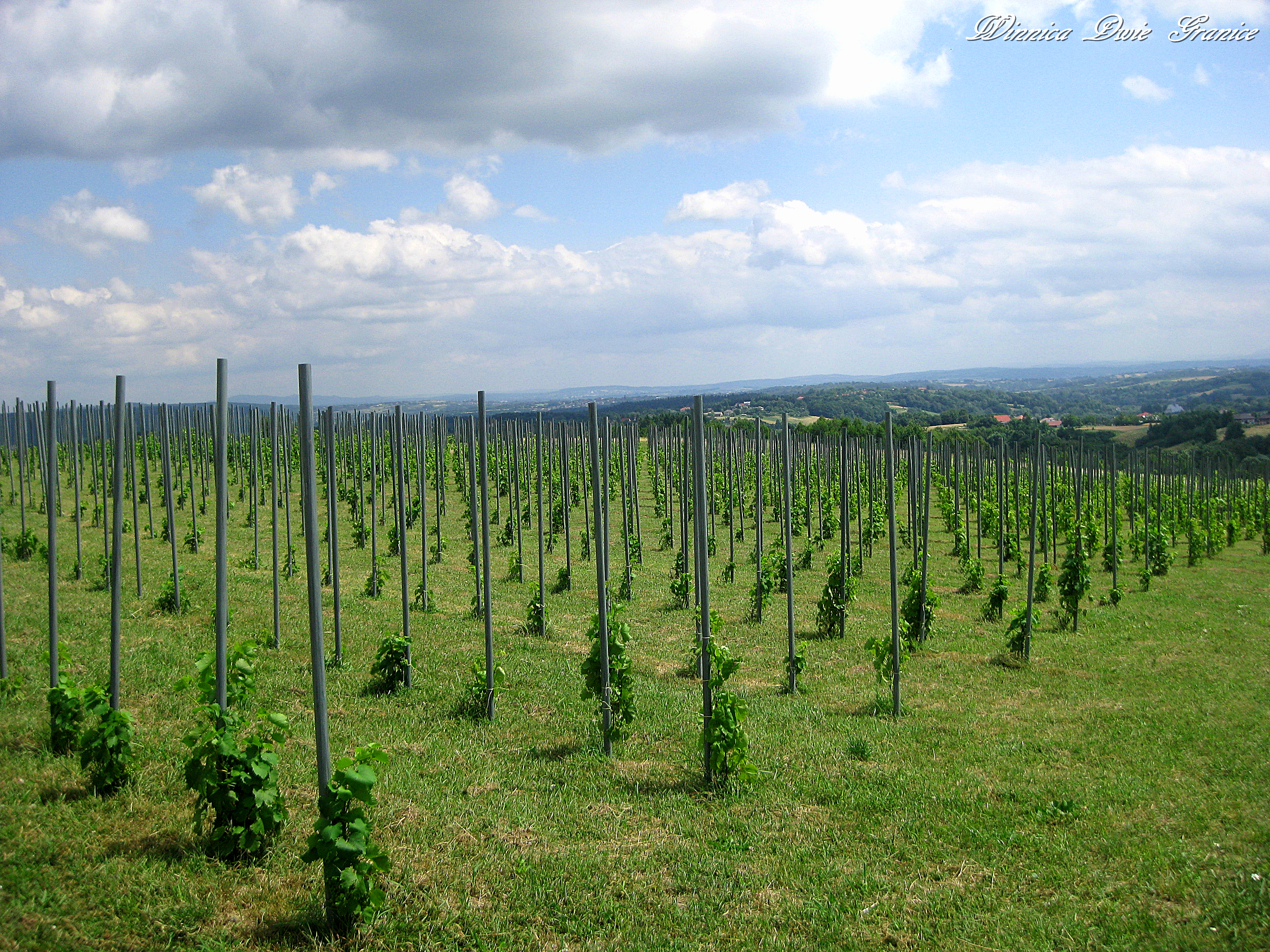 Winnica "Dwie Granice" Państwa Lidii i Marka Nowińskich, założona w Bączalu Górnym koło Jasła